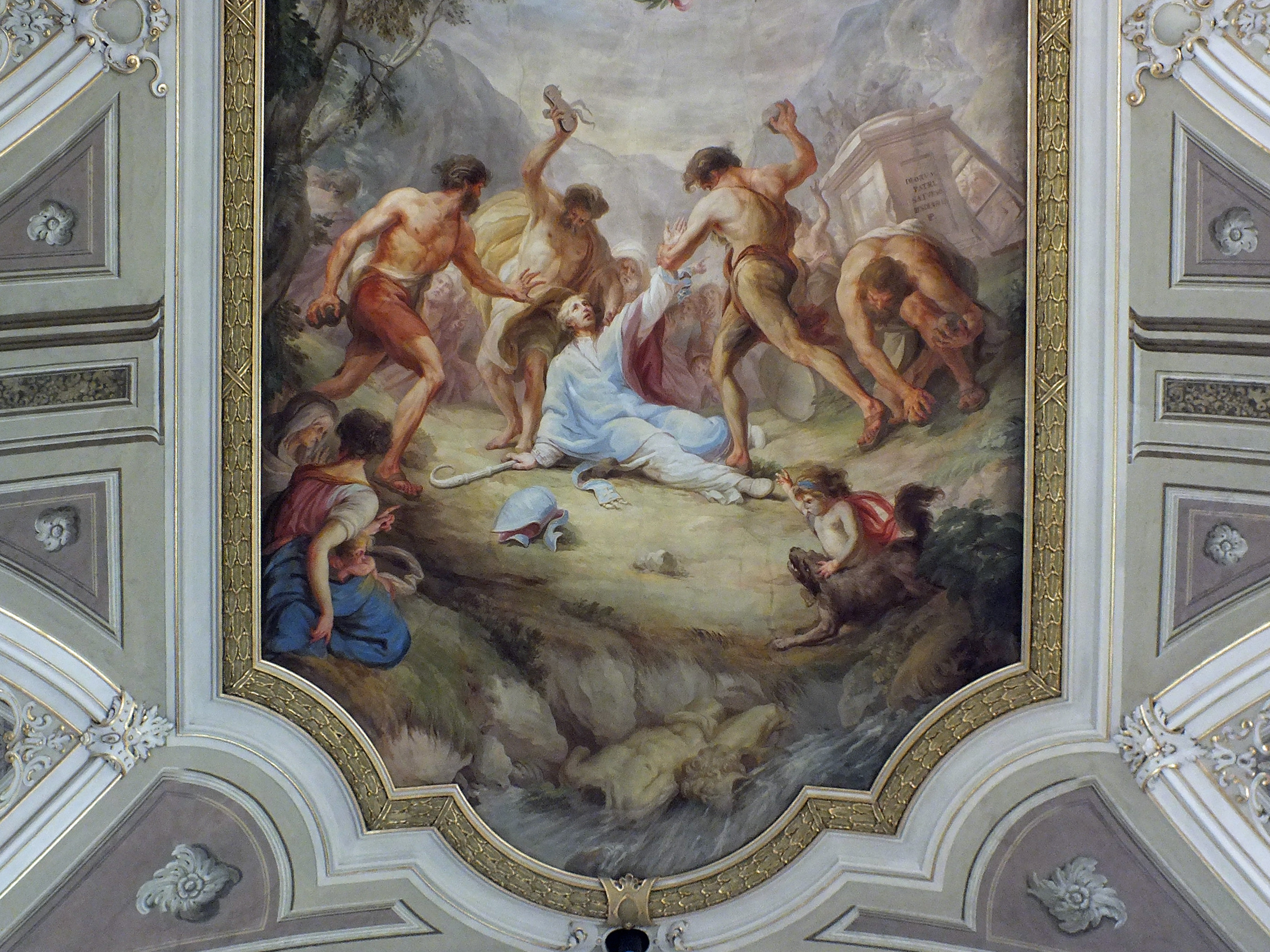 Deckenfresko (Ausschnitt) im Langhaus der Pfarrkirche Maria Himmelfahrt in Kaltern. Es stellt das Martyrium des hl. Vigilius dar, gemalt 1792/1793 von Joseph Schöpf.